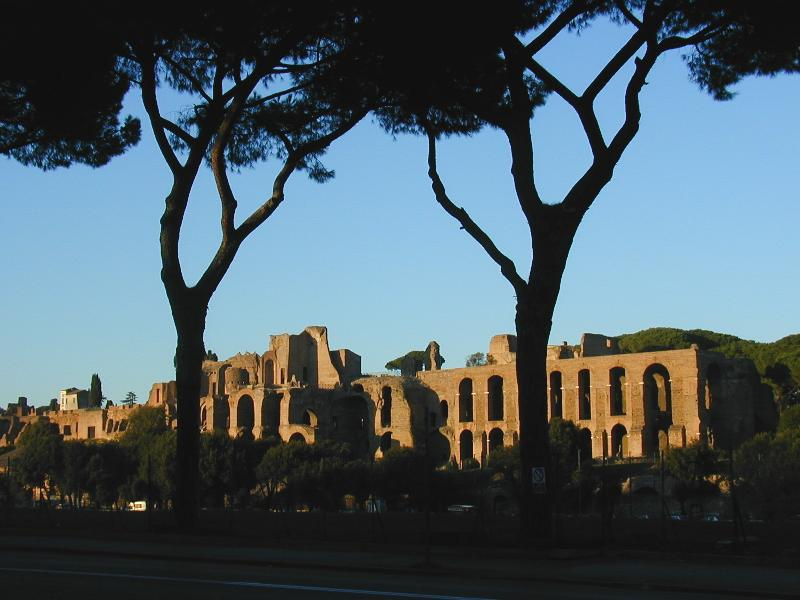 Roma, il Palatino visto dall'Aventino.